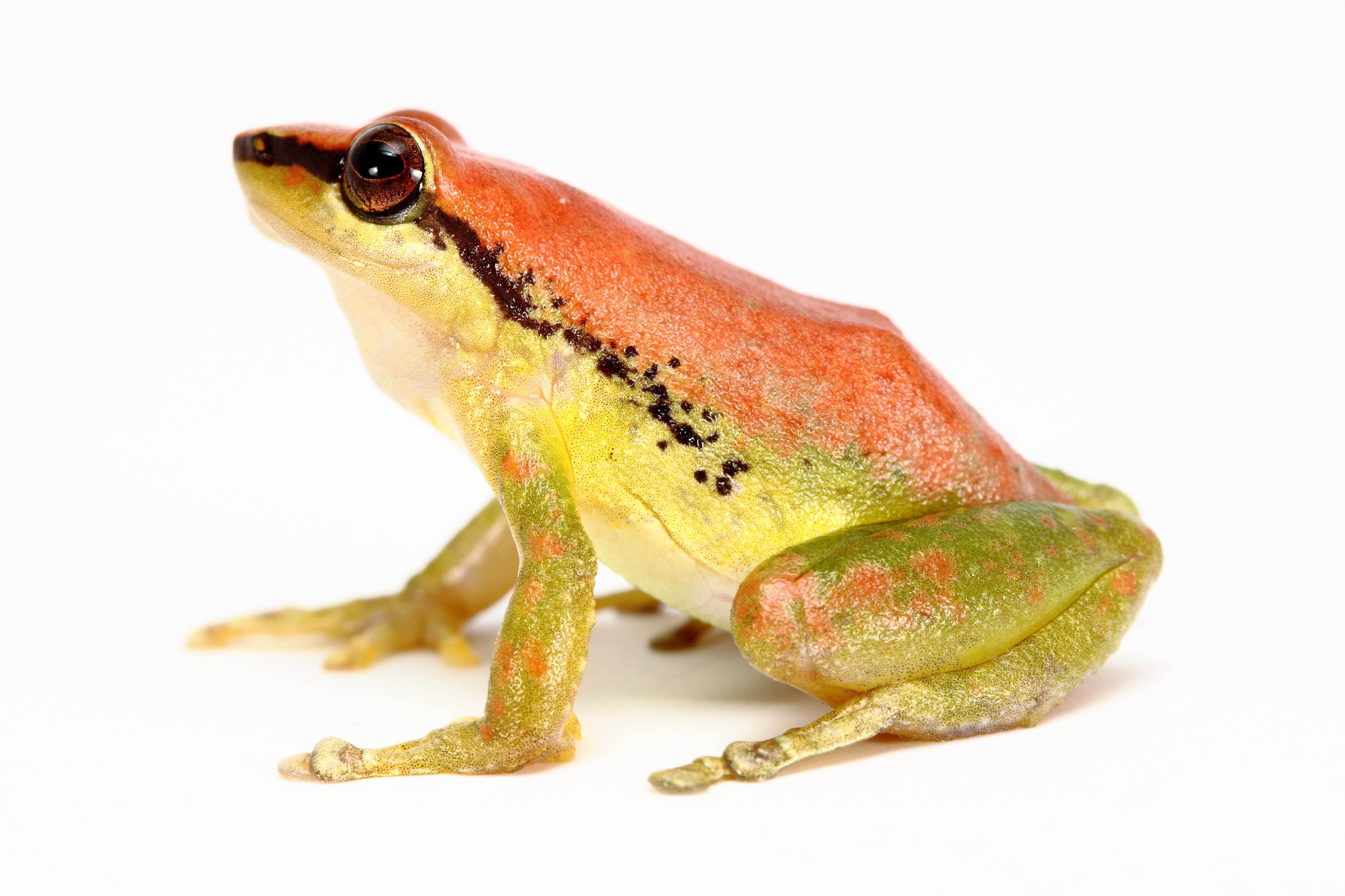 From Morona-Santiago, Ecuador Foto de Santiago R. Ron-FaunaWebEcuador [ .ec/Vertebrados/anfibios/ web]